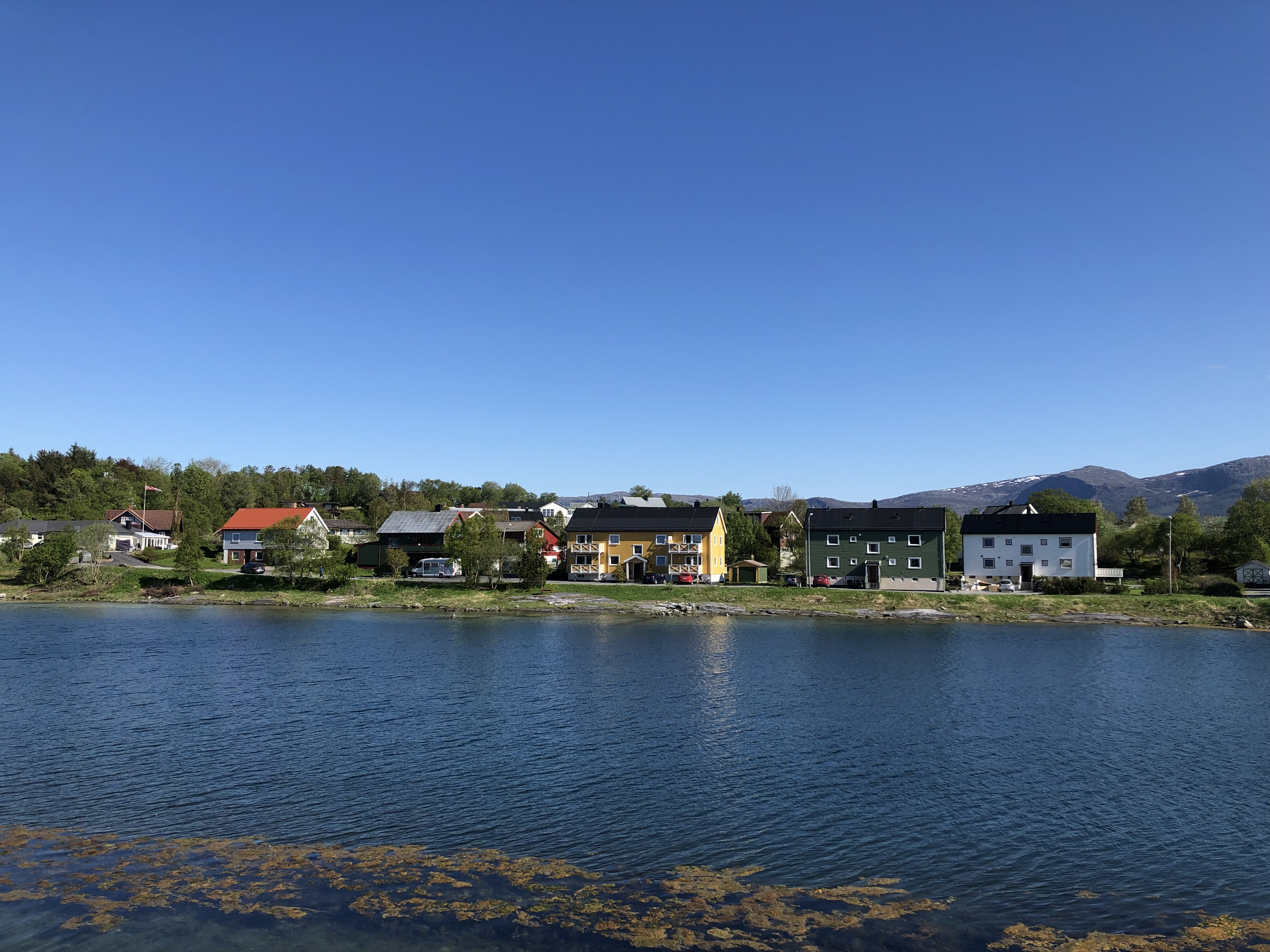 Frøkenosveien i Brønnøysund, sett fra Innerveien.